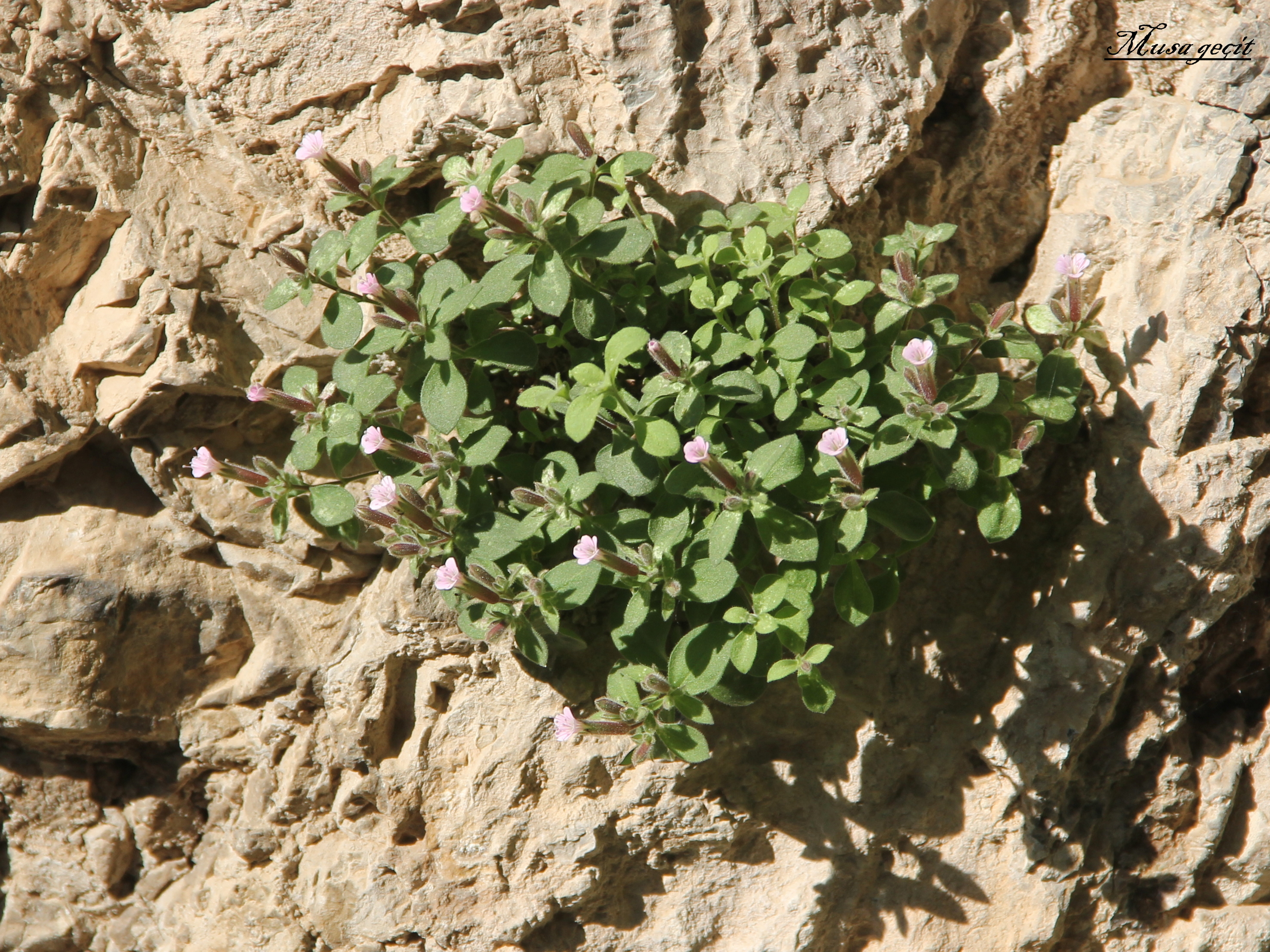 Yer: Şırnak Saponaria suffruticosa